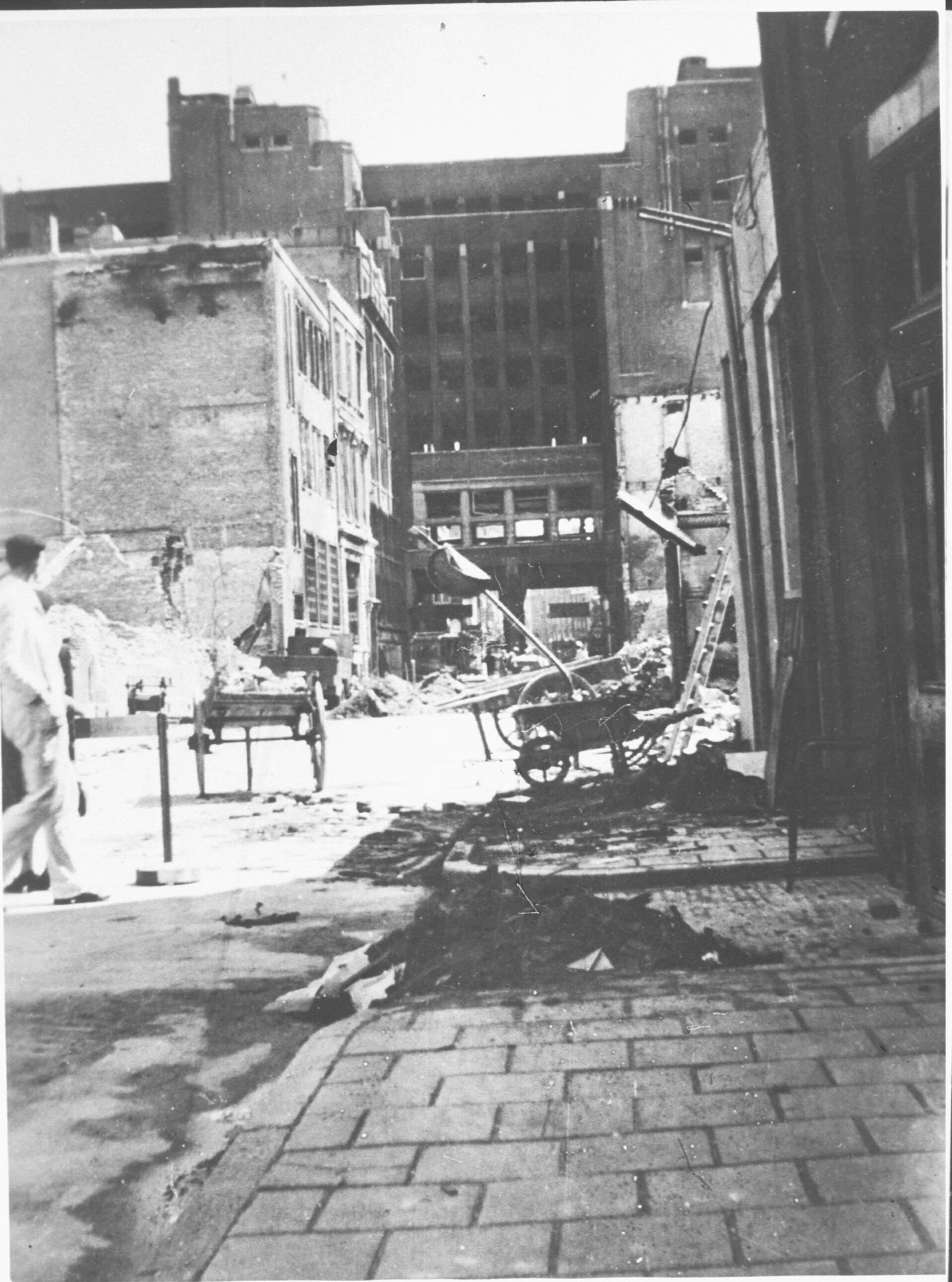 Amsterdam: schade 'Hotel Carlton'. Op 27 april 1943 stortte om 02.34 uur het vliegtuig neer, een Halifax V Serial DG423 76 Sqduadron, registratie MP-H. Bemanning: Piloot: Sgt. D.G.McNab Waarnemer: Sgt.F.N.Slingsby Bommenrichter: P/O. N.D.Fleming Radio:Sgt. B.F.Keable Schutters: Sgt. J.Clerg en Sgt. C.C.Strain Boordwerktuigkundige: Sgt. J.Wood Neergeschoten door: Ofw. H.Vinke IV/NJG 1